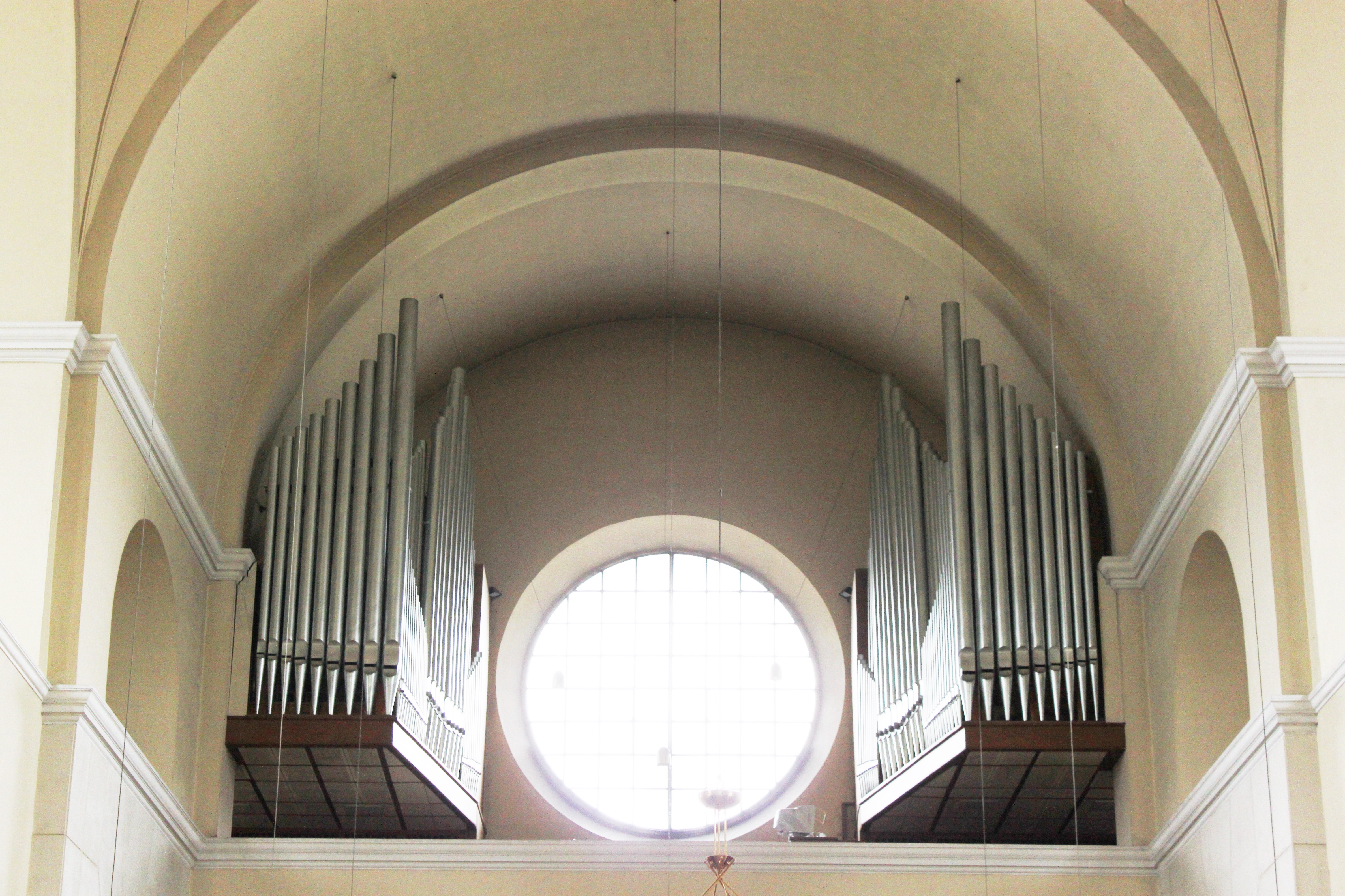 Orgel der Pfarrkirche St. Anton von Padua in Wien X., errichtet 1962 von Dreher & Reinisch